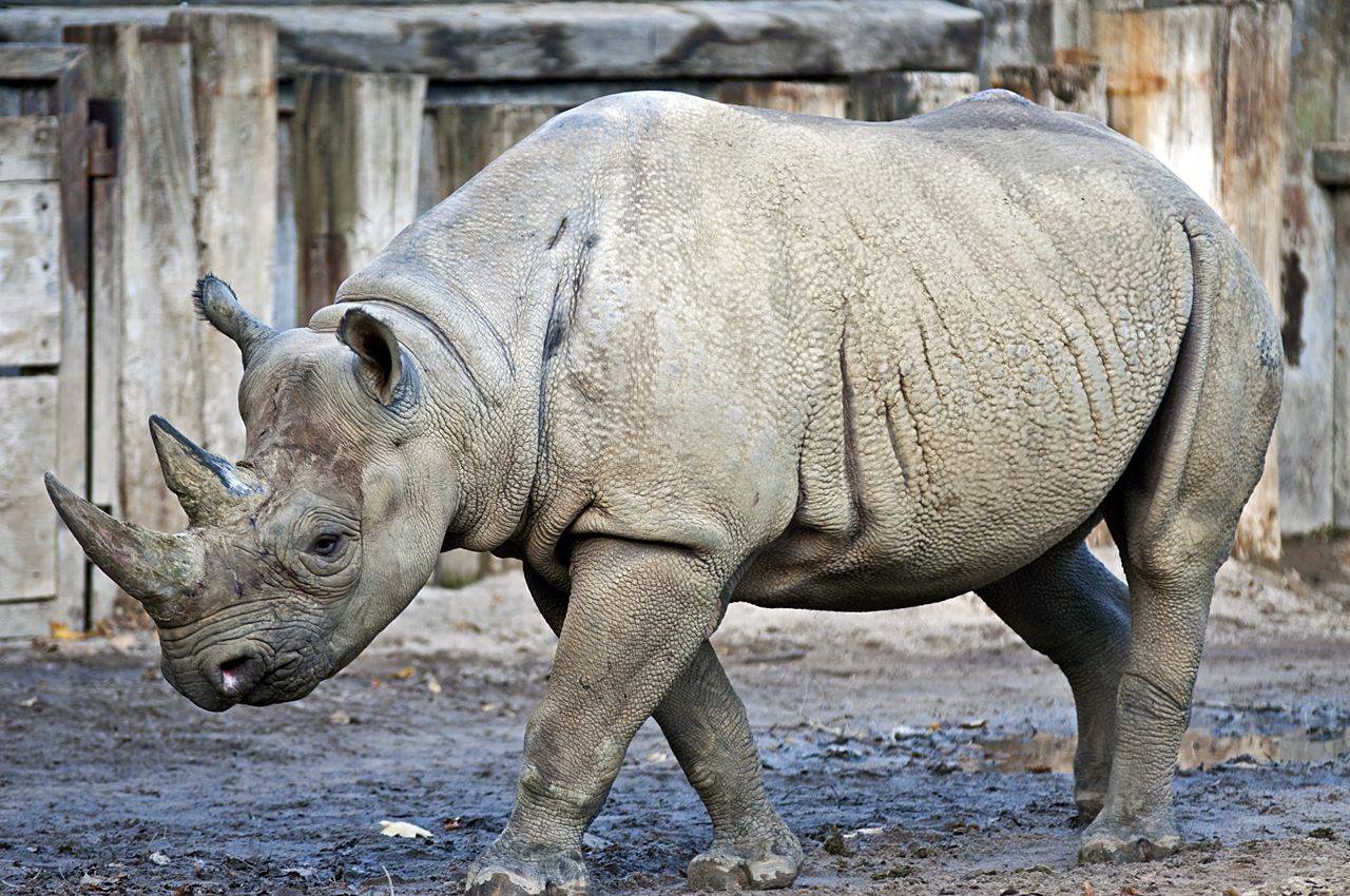 Spitzmaulnashorn (Diceros_bicornis) im Leipziger Zoo Camera data Camera: Nikon D90 Lens: Tamron SP AF 70-200mm F/2.8 Di LD [IF] MACRO